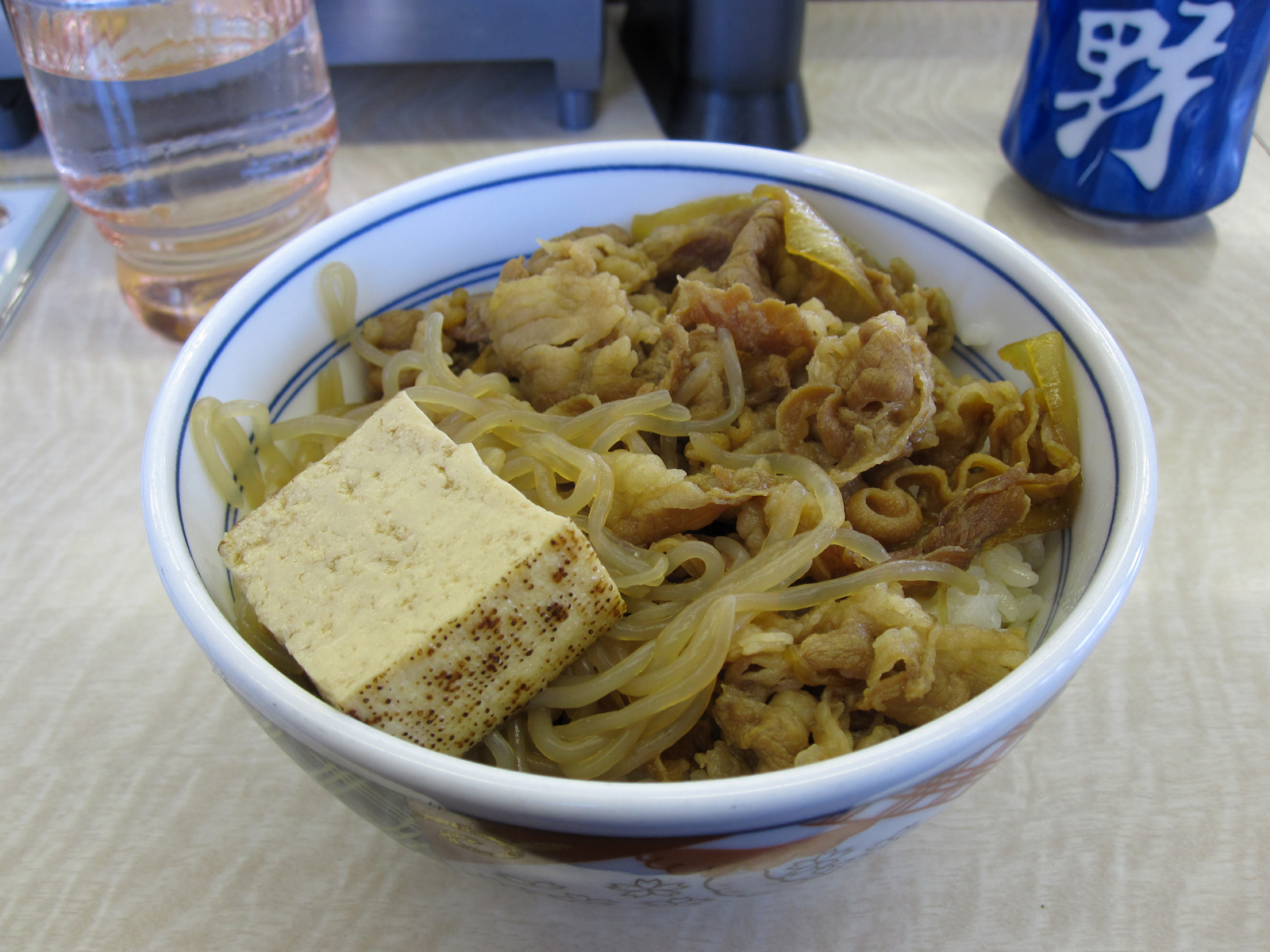 吉野家の牛鍋丼